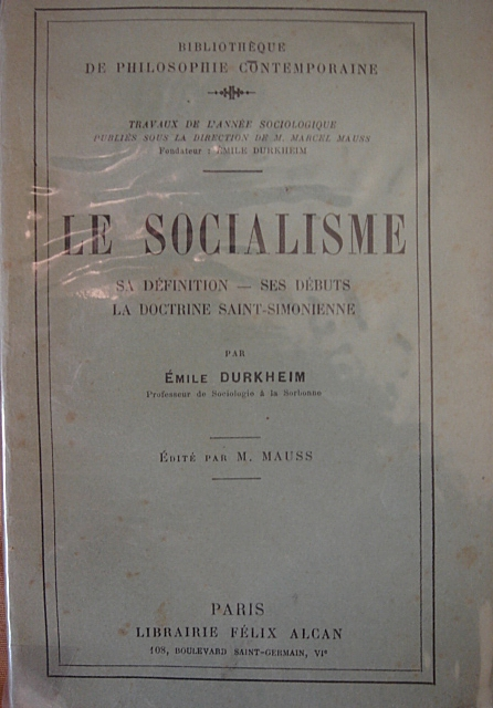 Couverture du livre de Emile Durkheim, Le Socialisme